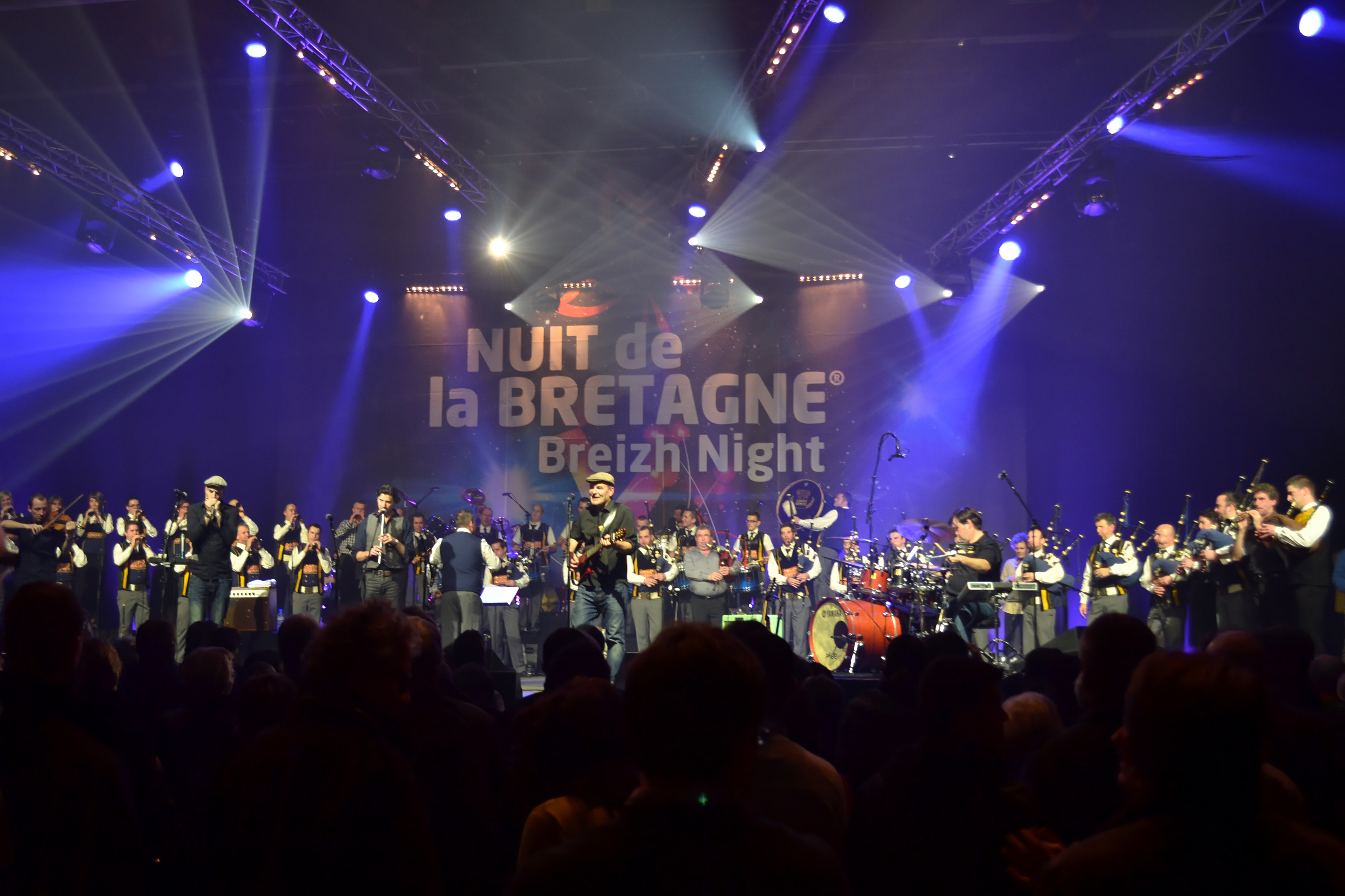 Fest-Rock en concert pour la Nuit de la Bretagne au parc de Langolvas le 11 janvier 2014.